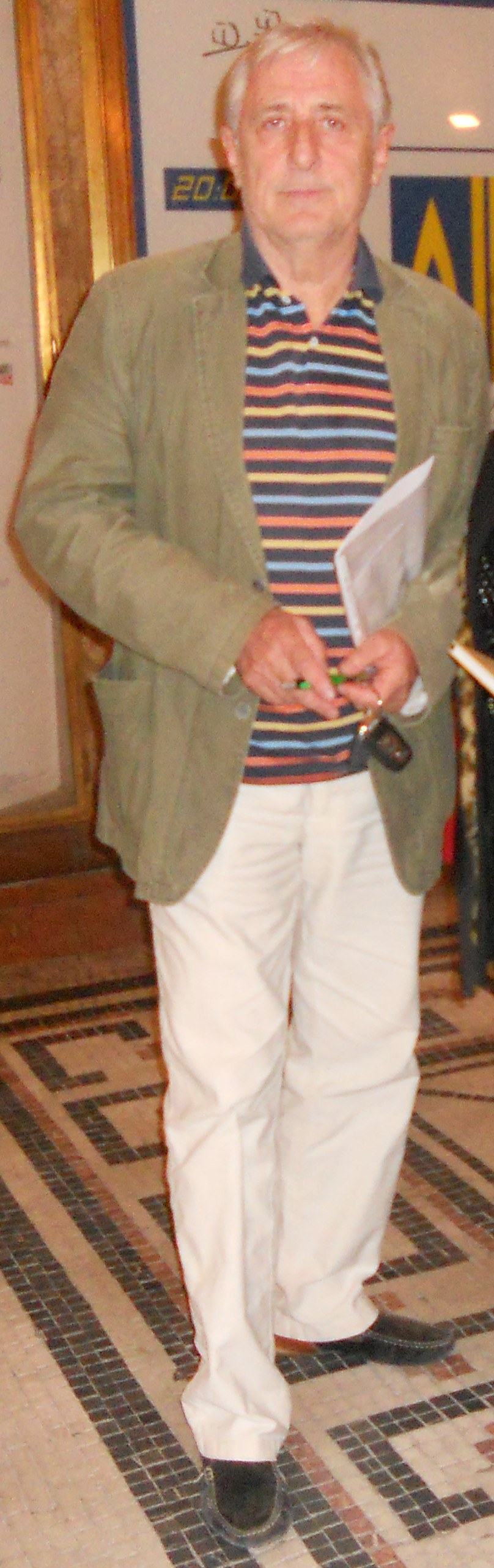 Karel Heřmánek, český herec